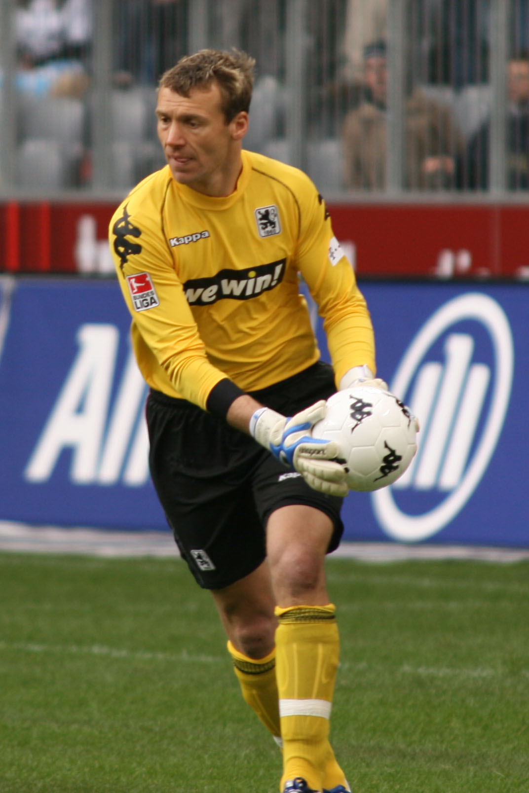 Michael Hofmann, player of TSV 1860 München, 1860-Fürth, 21.01.2007, Allianz Arena, Munich, original image